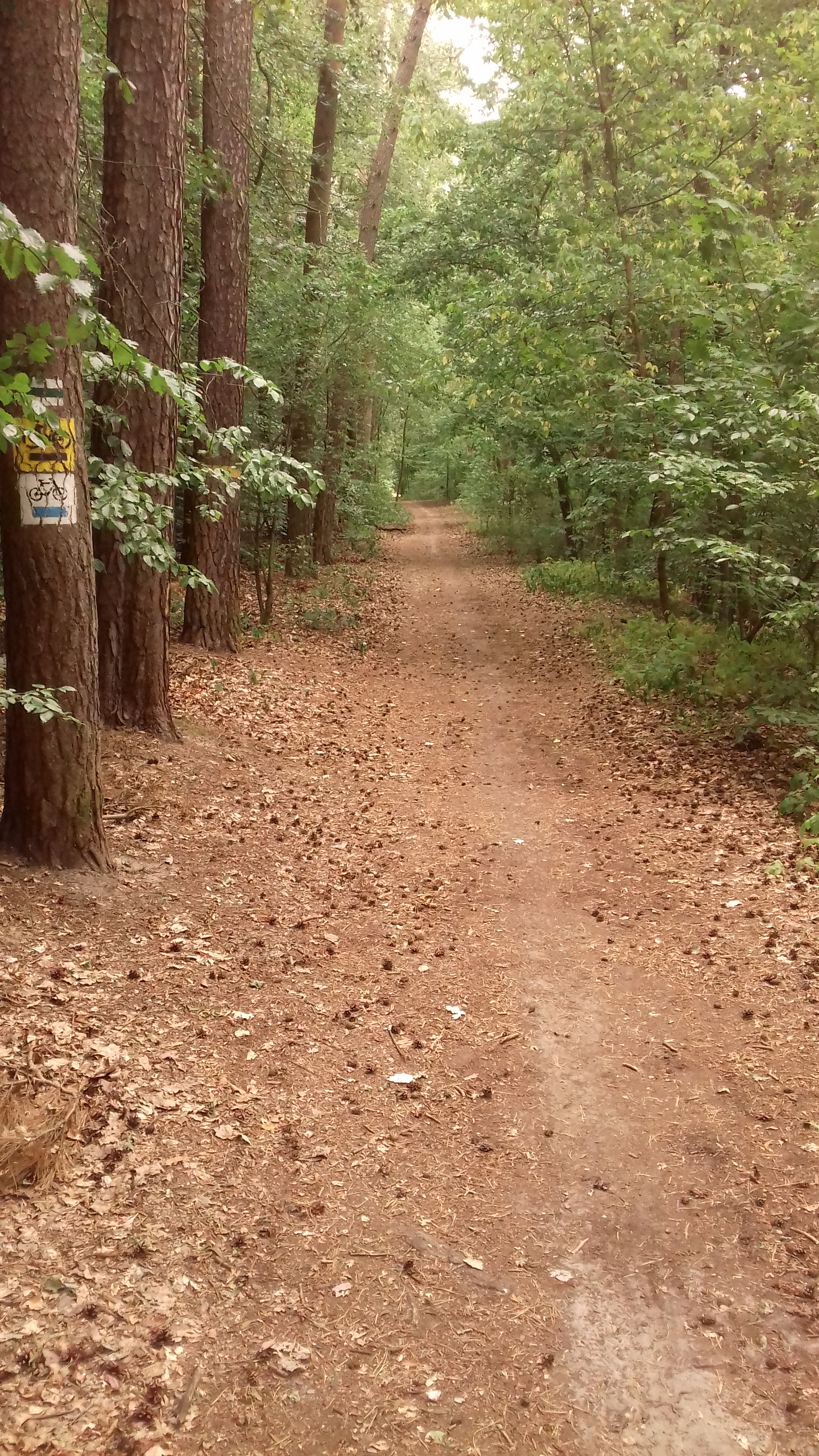 Szlak pieszy im. Fiedlera nad brzegiem Warty w Puszczykowie - odcinek wspólnego przebiegu ze szlakiem rowerowym.